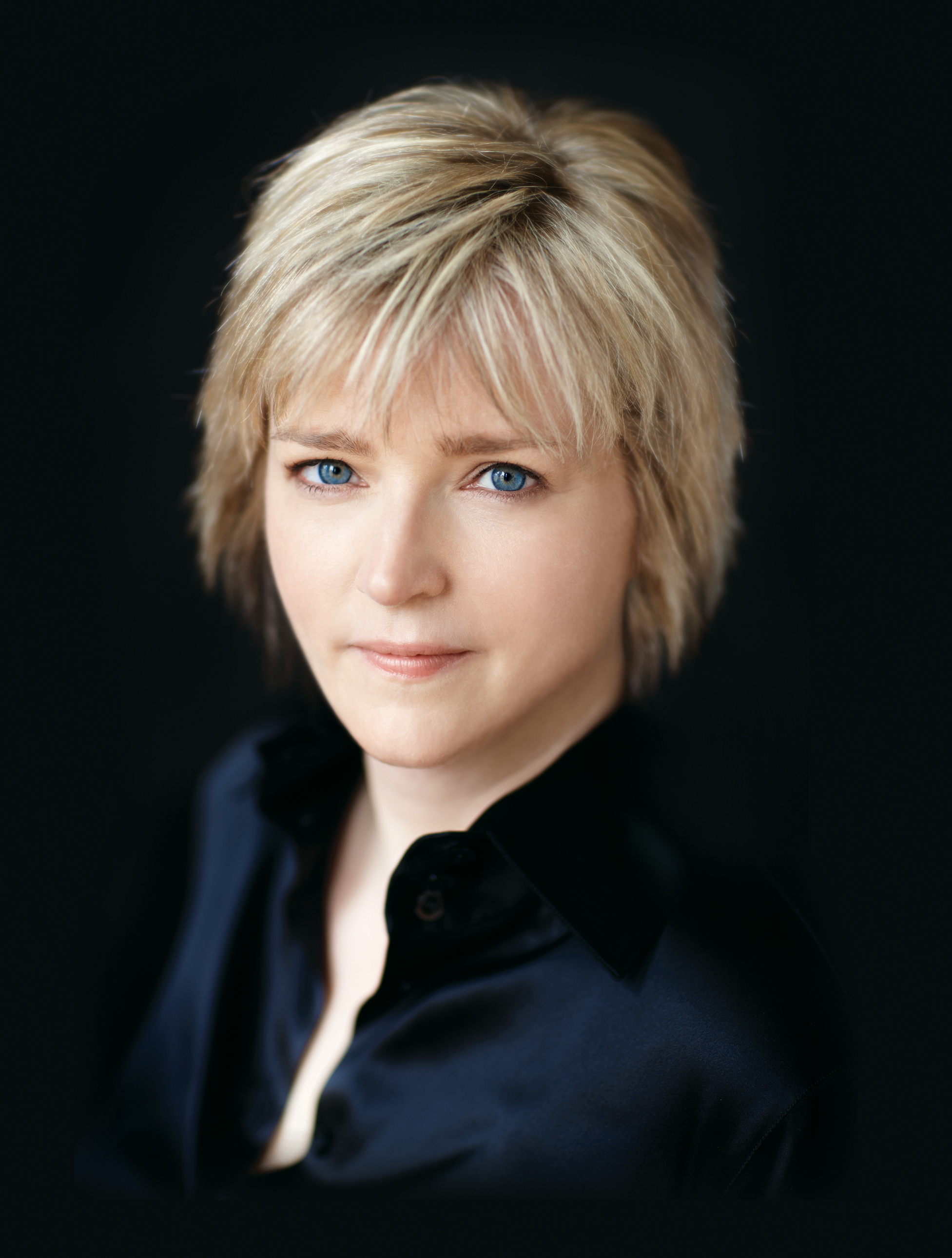 Portrait von Karin Slaughter aus dem Jahr 2012